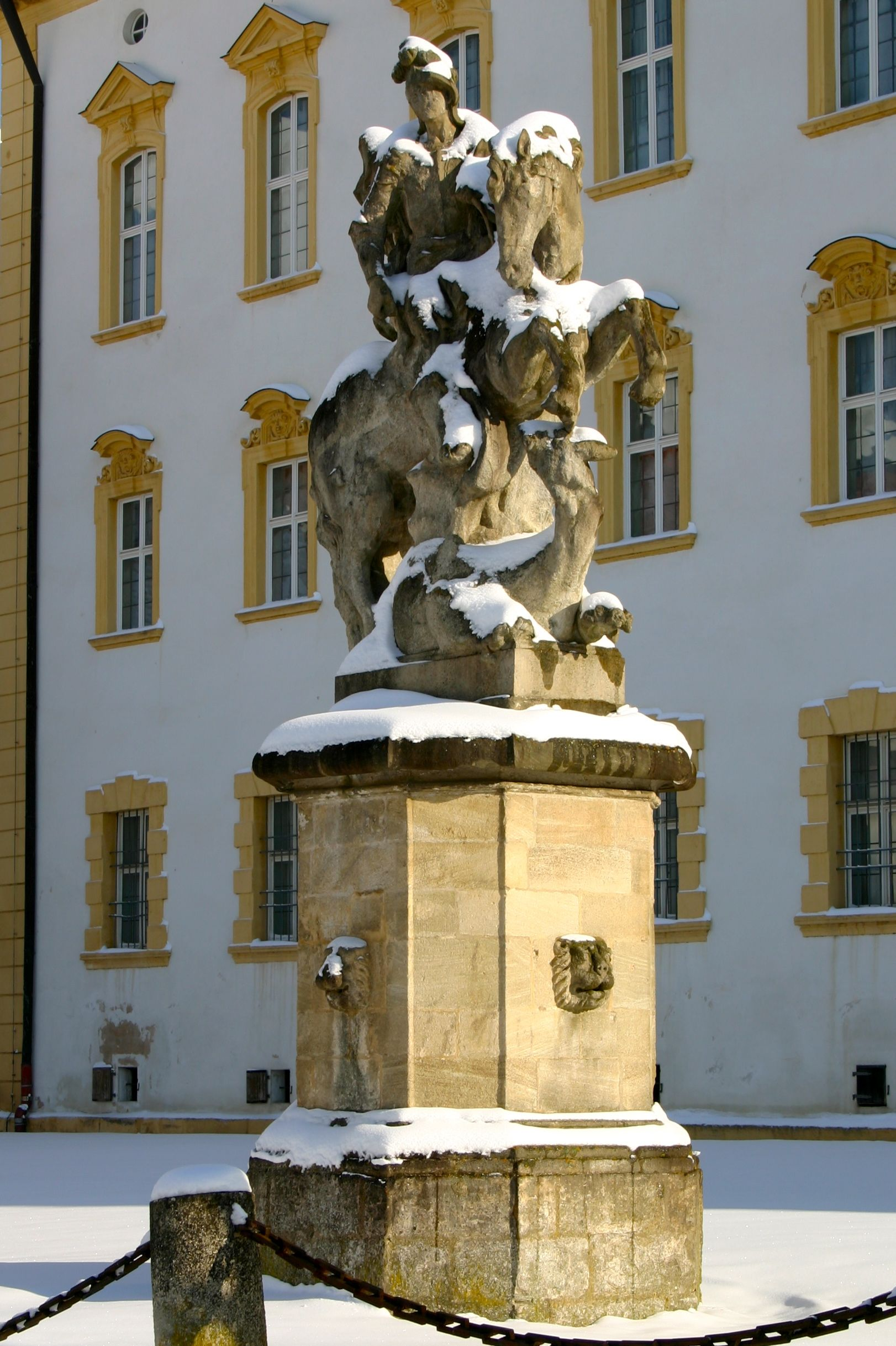 Georgsstatue Schloss Ellingen